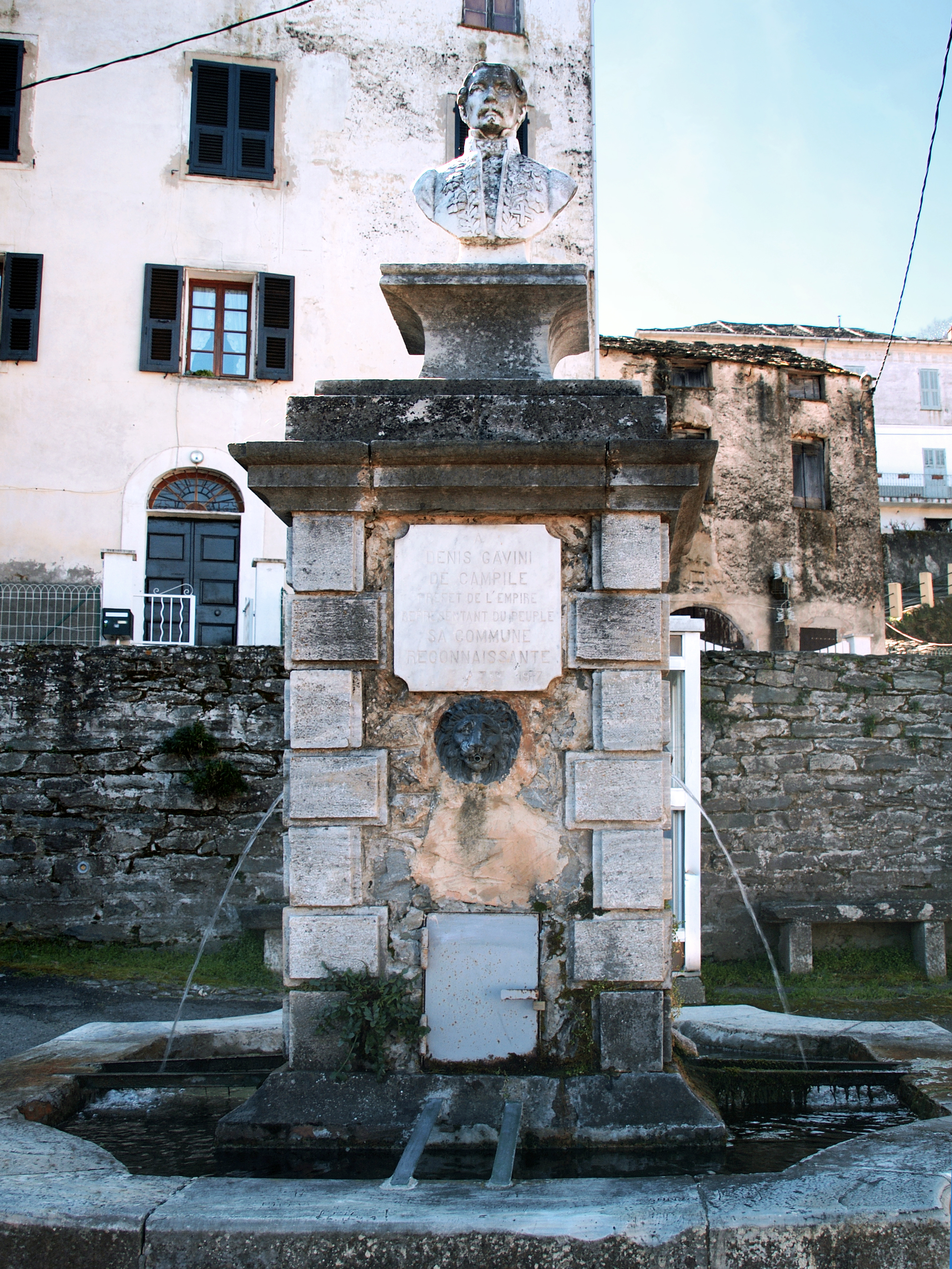 Campile, Castagniccia (Corse) - Fontaine coiffée du buste de Denis Gavini, préfet sous le Second Empire (à l'Inventaire général du patrimoine culturel) This edifice is indexed in the base Mérimée, a database of the French architectural patrimony maintained by the French Ministry of Culture, under the reference IA2B000587.